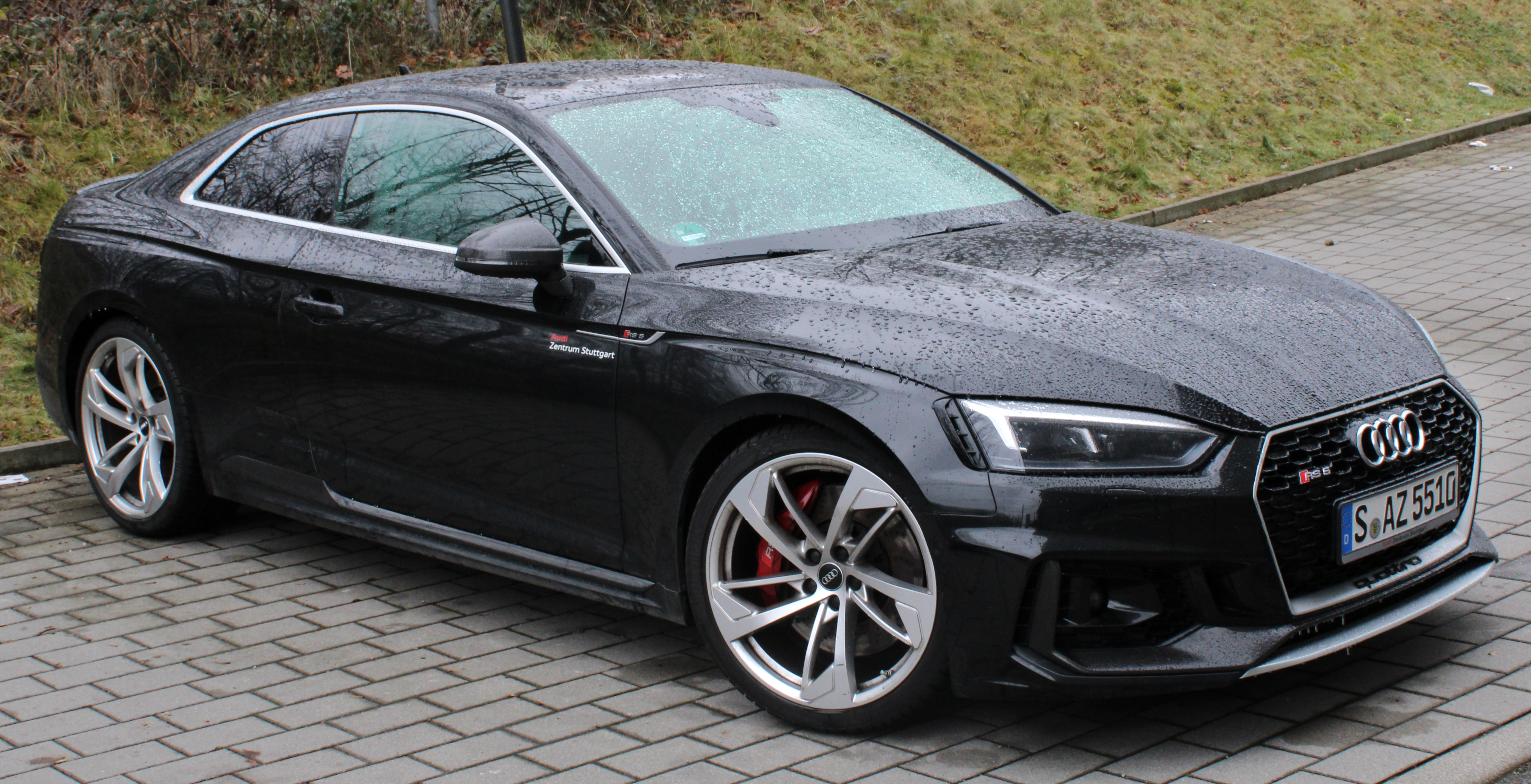 Audi RS5 Coupe in Stuttgart-Vaihingen